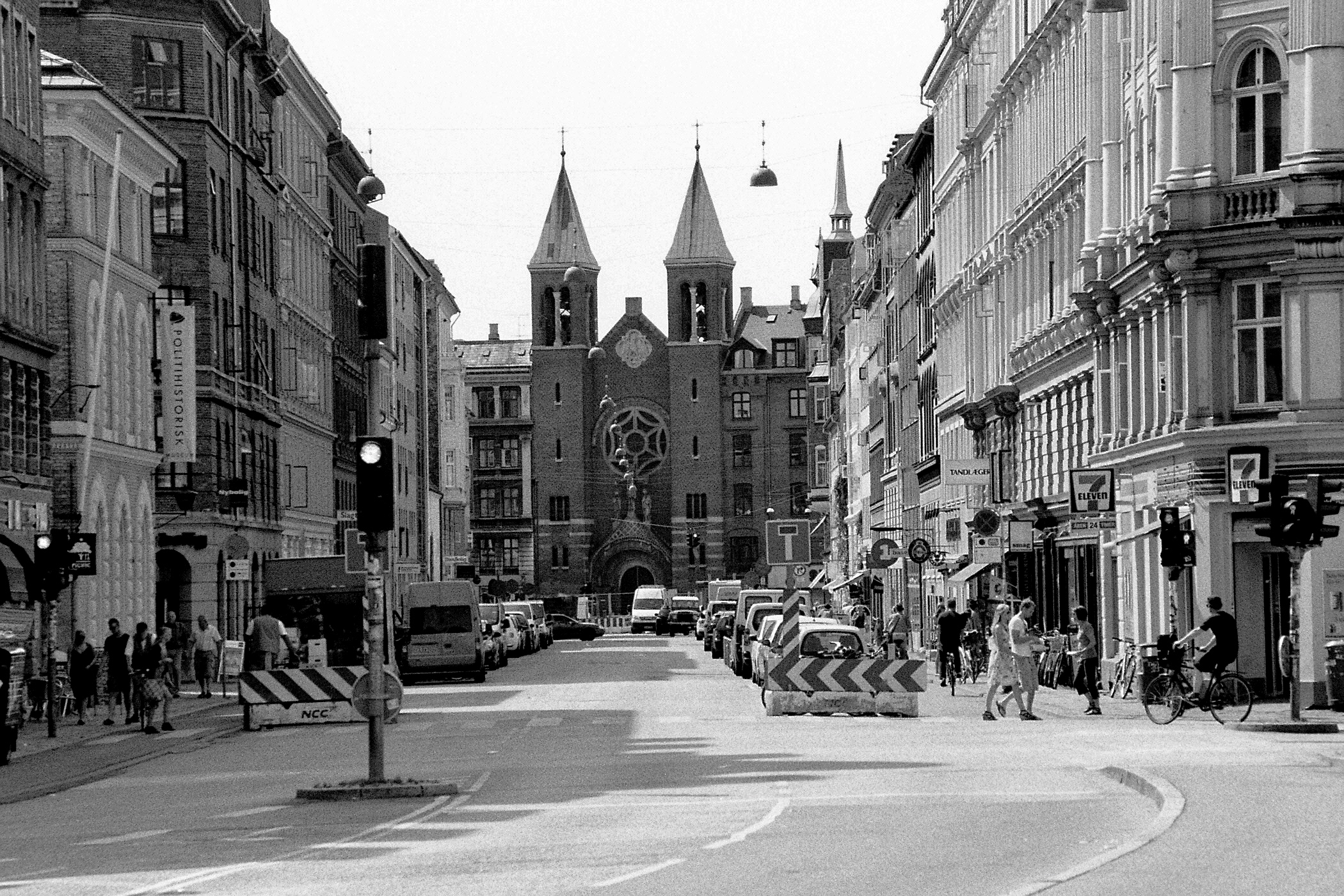 Fælledvej in the Nørrebro district of Copenhagen, Denmark